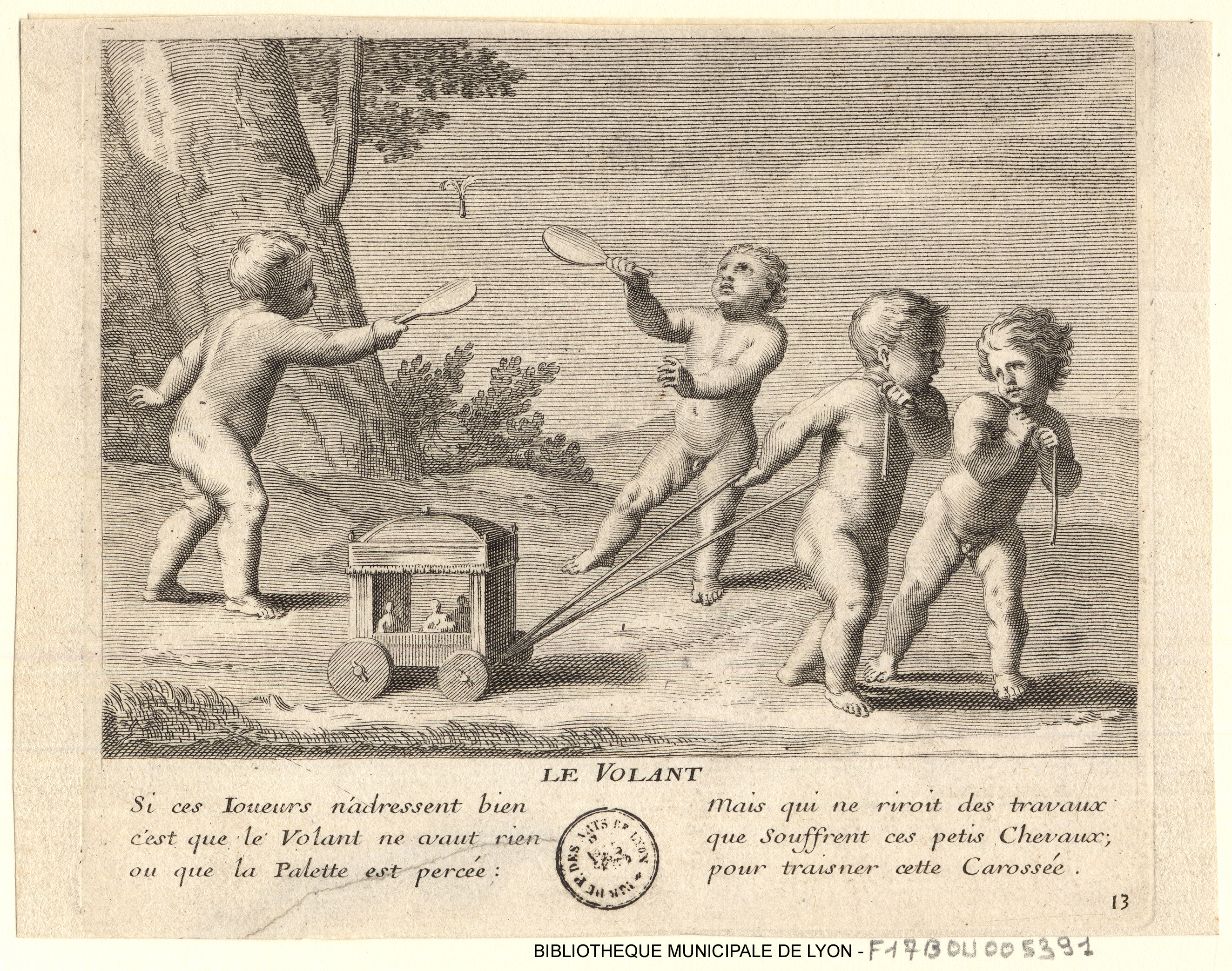 Jeux d'enfants